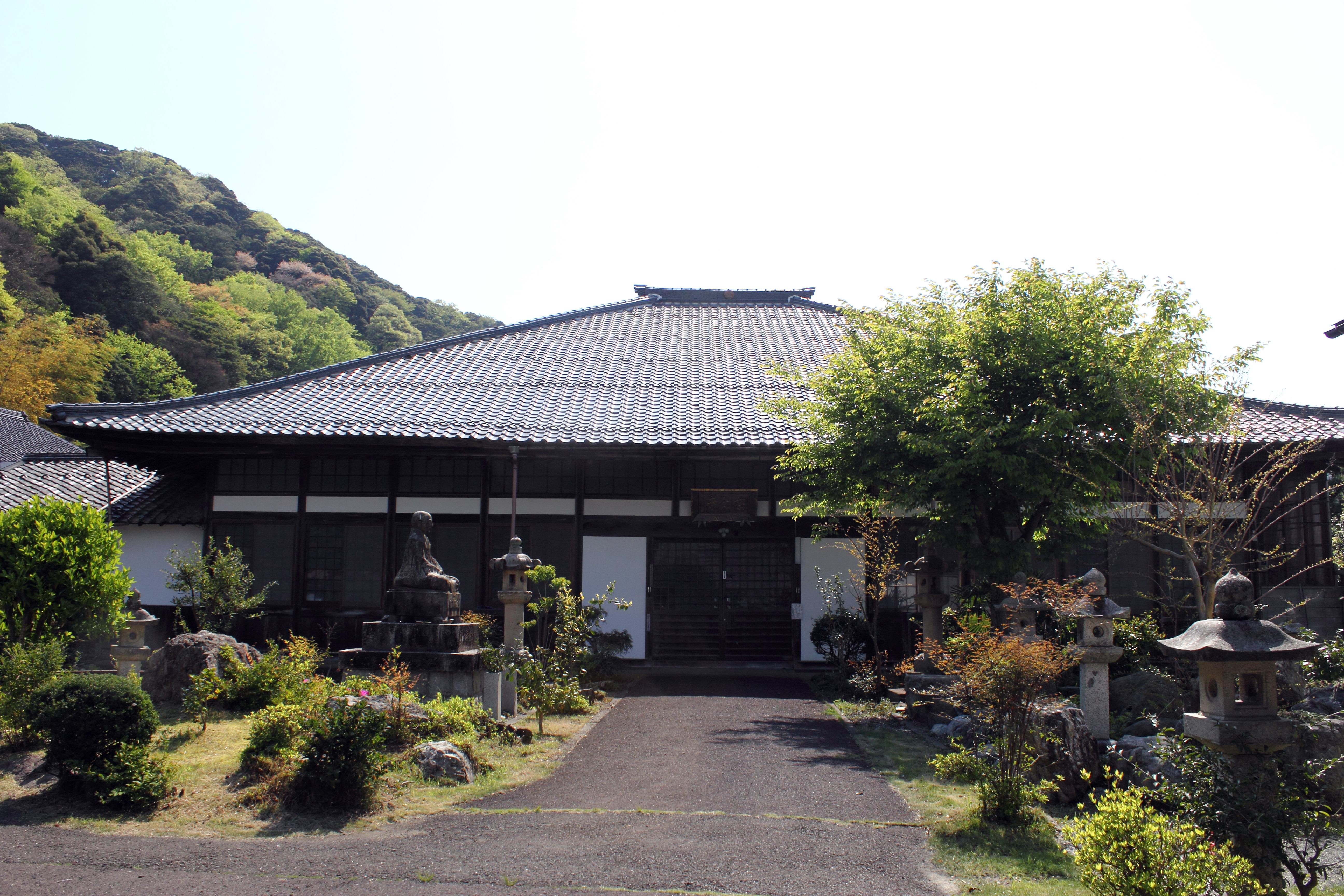 建康山空印寺